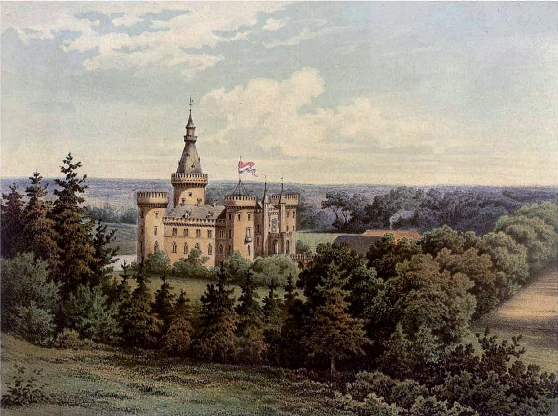 Schloss Moyland, Lithografie aus dem 19. Jahrhundert